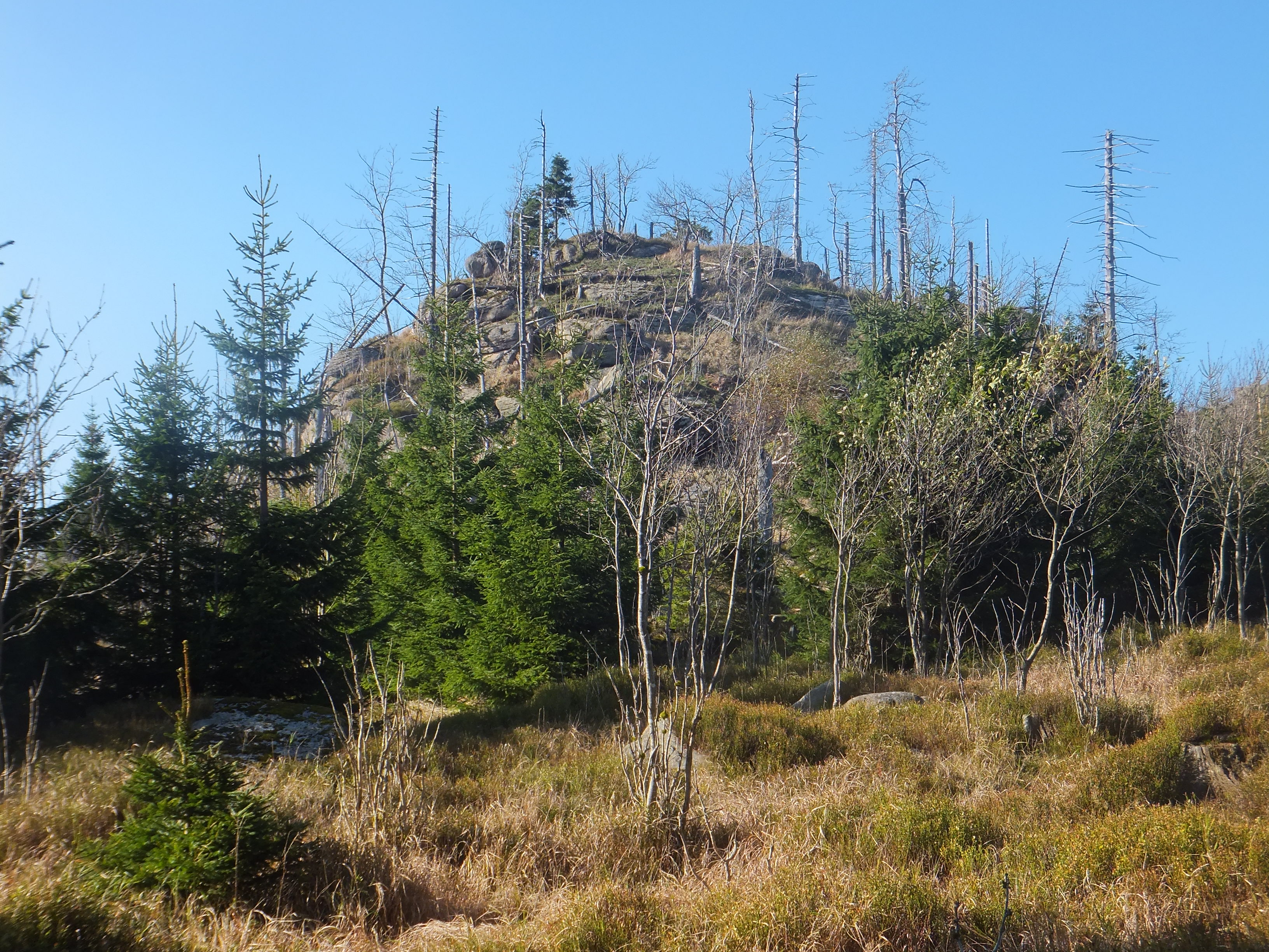 Gipfelaufbau des Quitschenberges (881,5 m) zwischen Torfhaus und Brocken im Harz